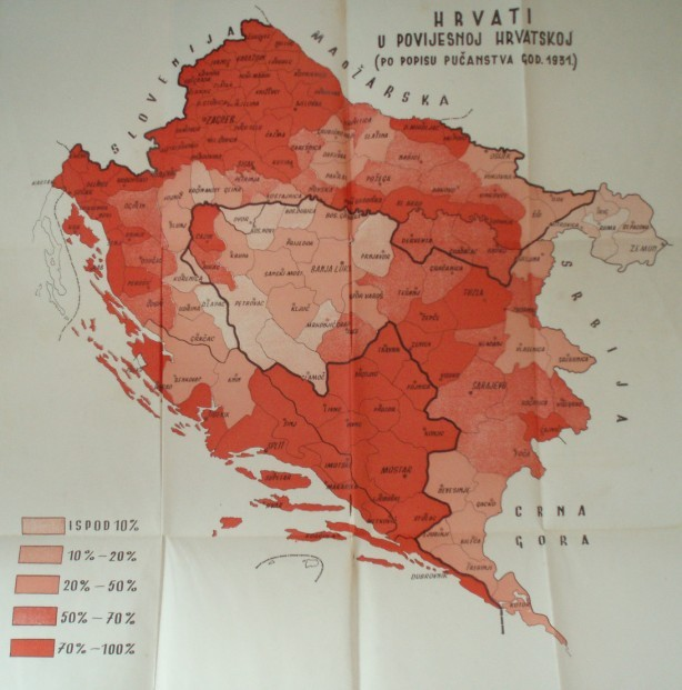 Zemljovid Banovine Hrvatske i "povijesnih hrvatskih zemalja" obzirom na udio hrvatskog stanovništva prema popisu 1931. (u Hrvate računati i današnji Bošnjaci)